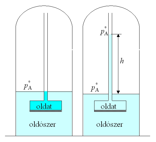 Az ozmózis értelmezése